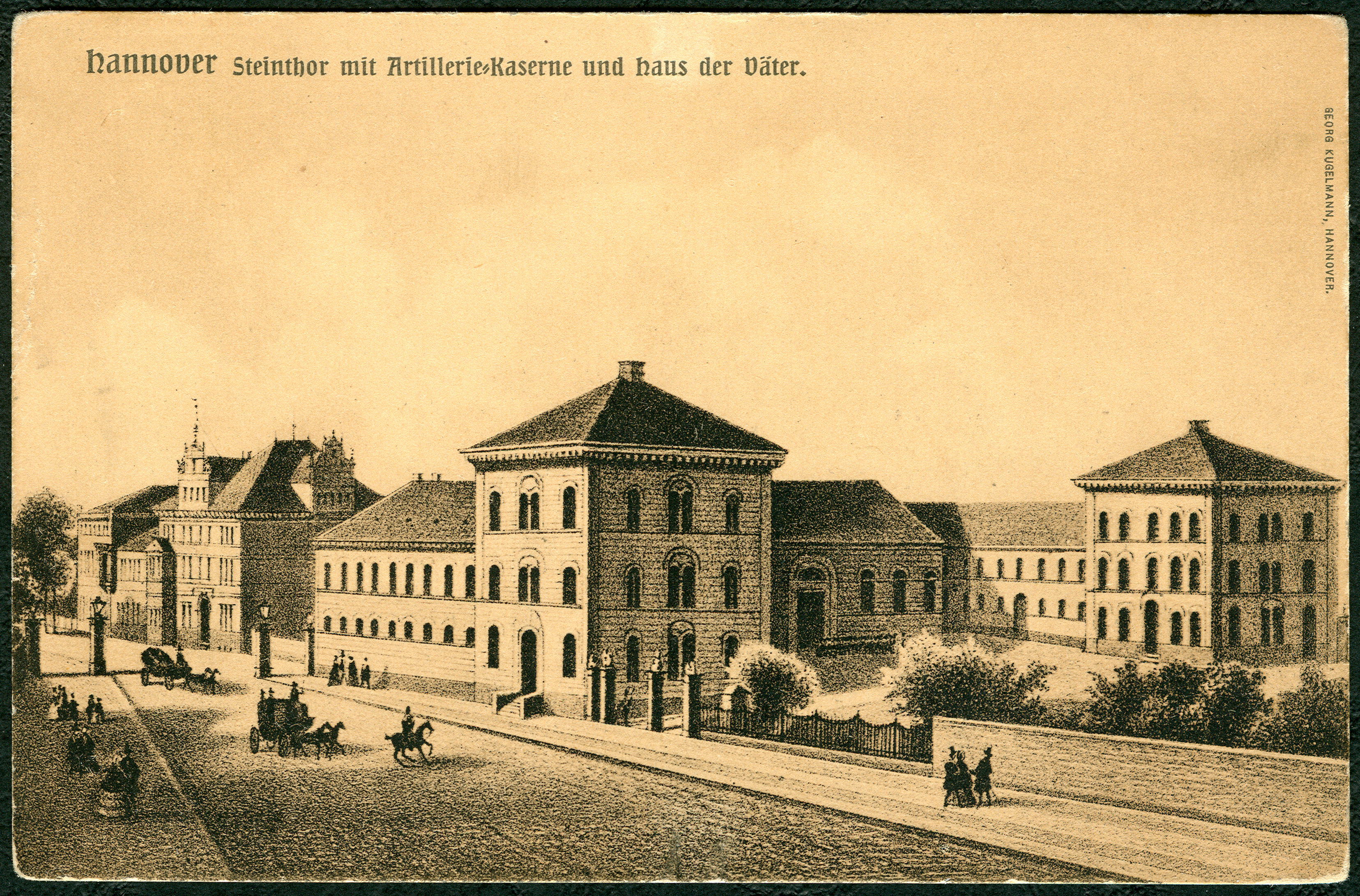 Die Ansichtskarte des Verlages Georg Kugelmann aus der Serie "Aus der guten alten Zeit, Serie B. 4." zeigt eine 2-dimensionale Reproduktion einer Lithographie des hannoverschen Zeichenlehrers Wilhelm Kretschmer, die nach diesem um 1850 angefertigt sein dürfte. Zu sehen ist im Vordergrund der Verlauf der Georgstraße in Höhe des (heutigen, Stand: Mai 2012) Platzes Am Steintor. Rechts im Bild ist die U-förmige Artilleriekaserne am Steintor zu sehen, deren umzäunt-ummauertes Freigelände sich in etwa bis zur (heutigen) Kanalstraße zog. Die zwei Pfeiler beidseits der Straße zeigen das verkleinerte Steintor eben um 1850 in Höhe der (heutigen) Münzstraße. Das Gebäude im Hintergrund mit den beiden reich gegliederten Giebeln ist das ehemalige Haus der Väter am Beginn der Langen Laube.